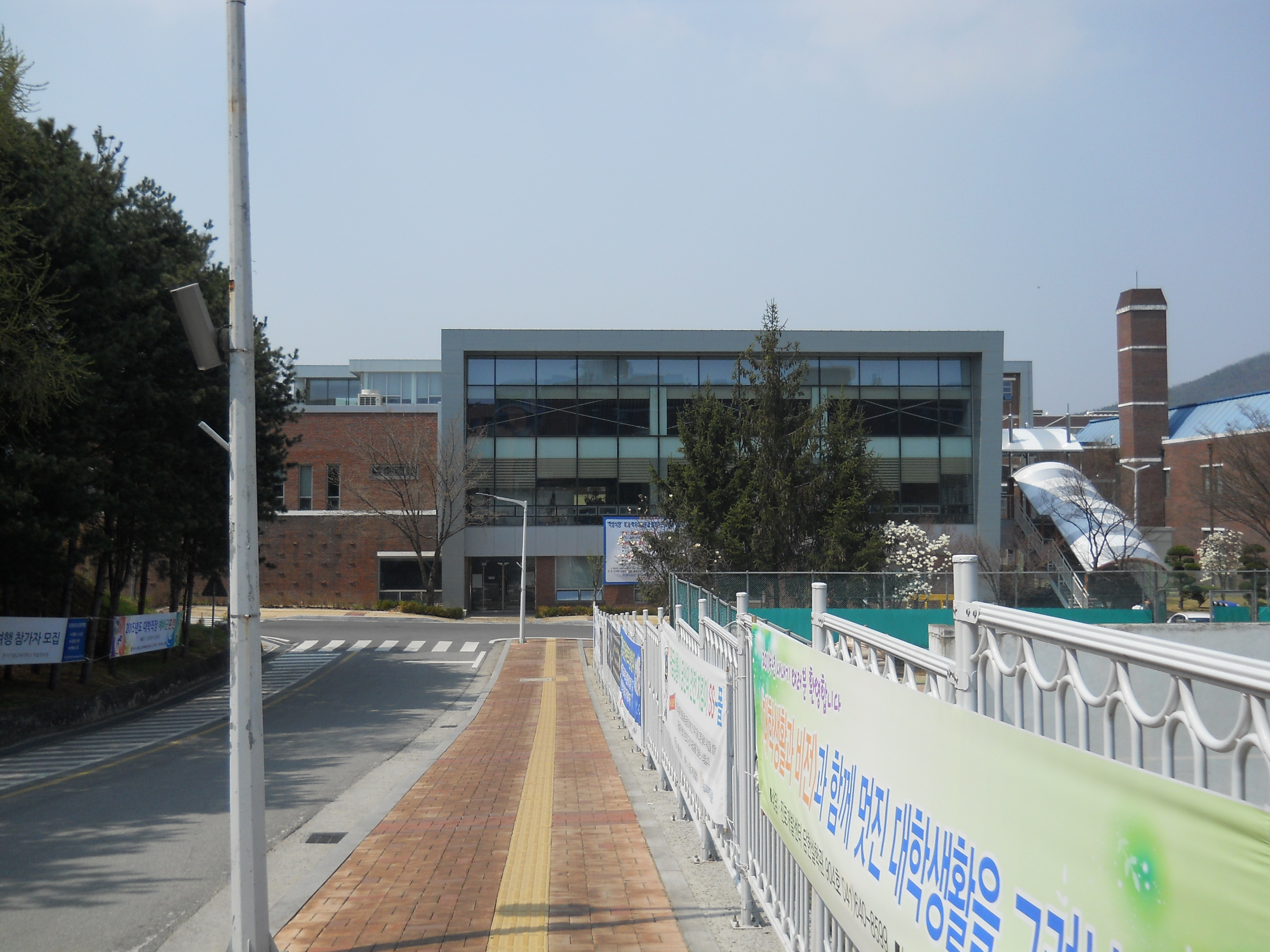 2015년 4월 한국기술교육대학교 학생회관 배면